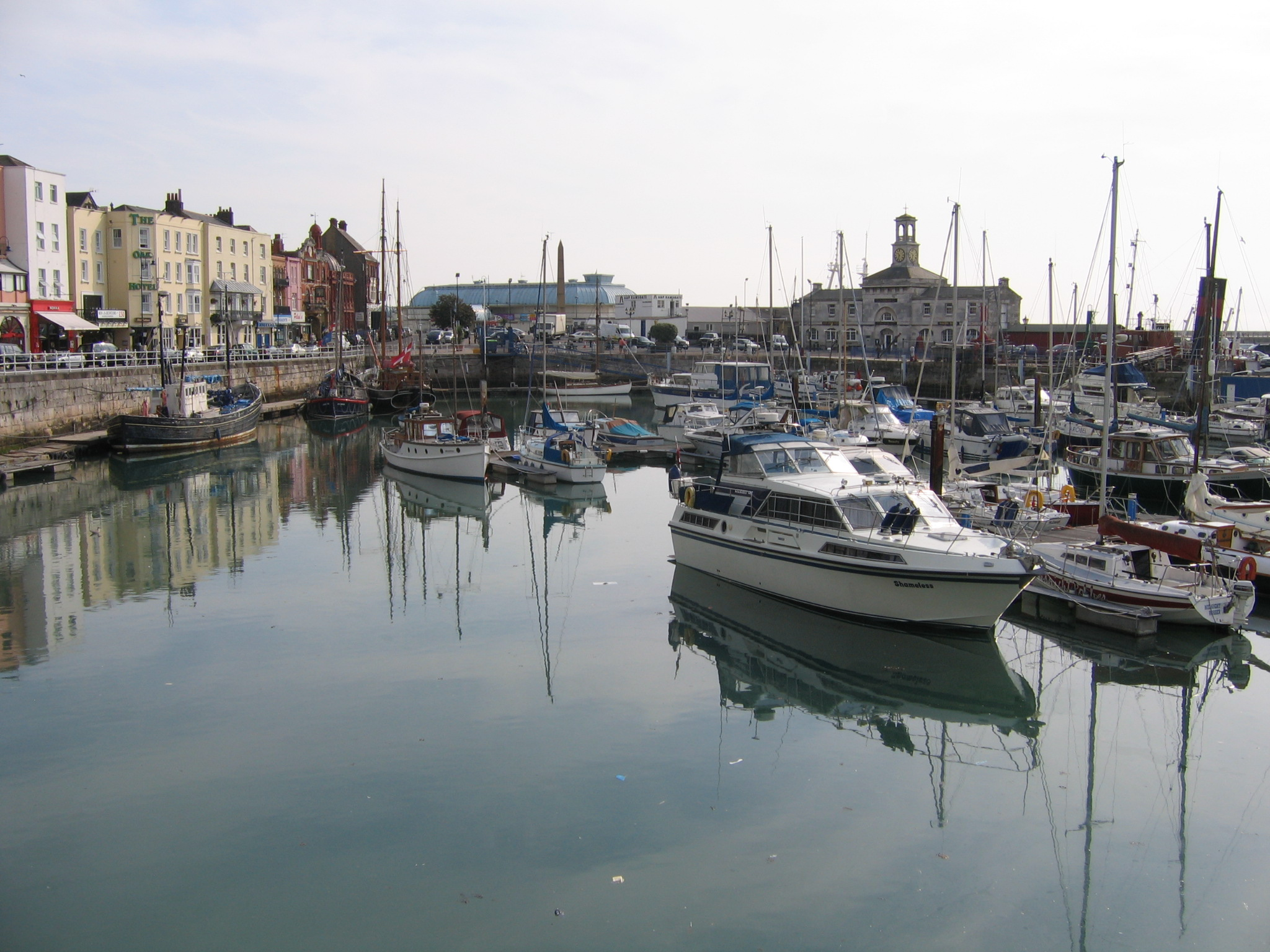 Yachthafen Ramsgates